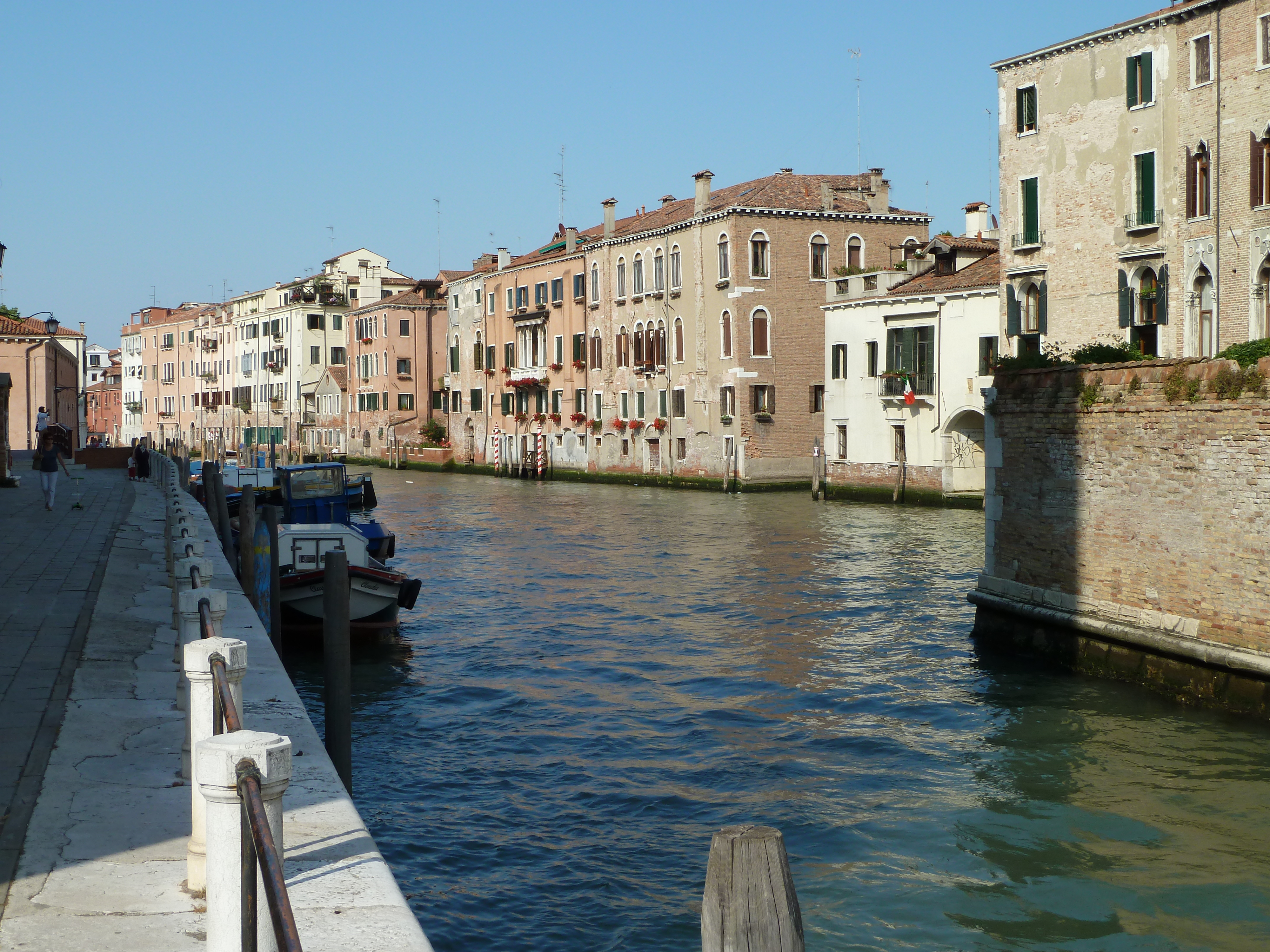 Rio di Noale (Venice)